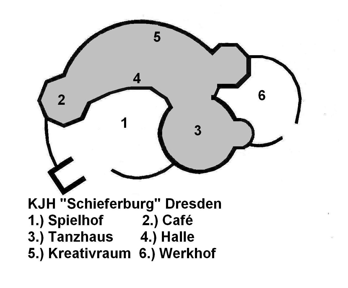 eigene Illustration nach verschiedenem Kartenmaterial, zumeist nach Architekturführer 2004